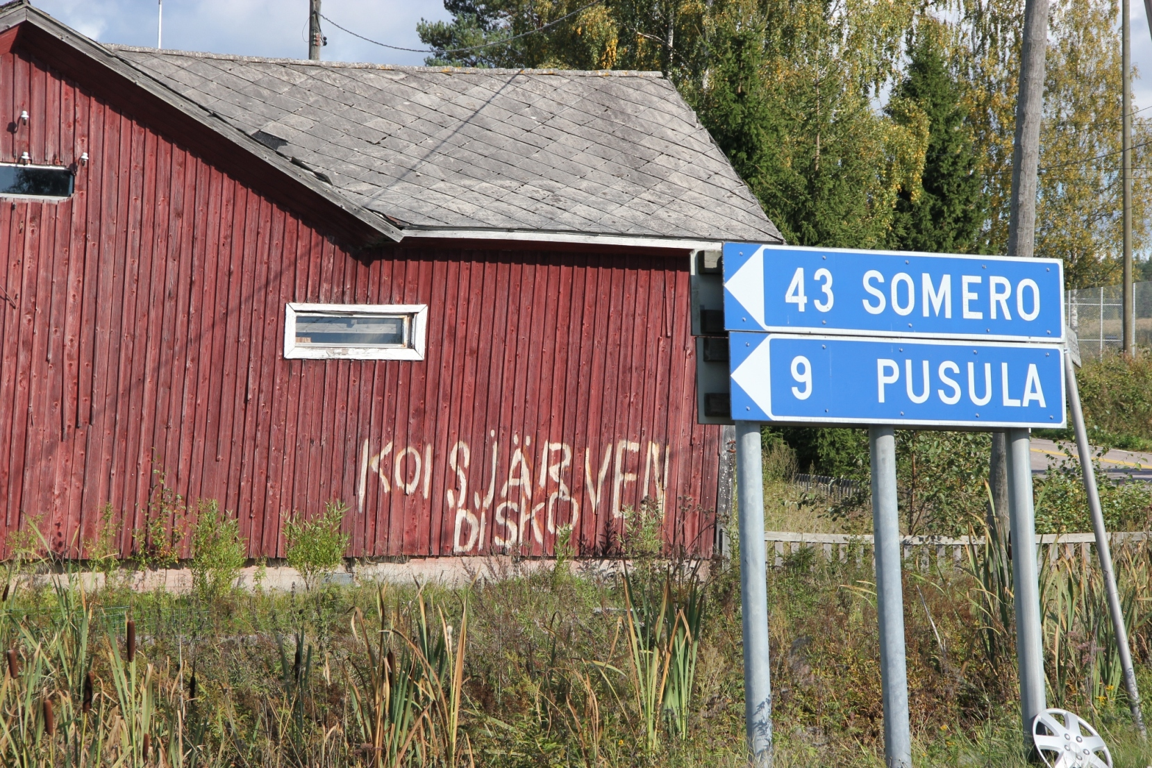 "Koisjärven disko", maamerkki Koisjärvi, Nummi-Pusula, Finland